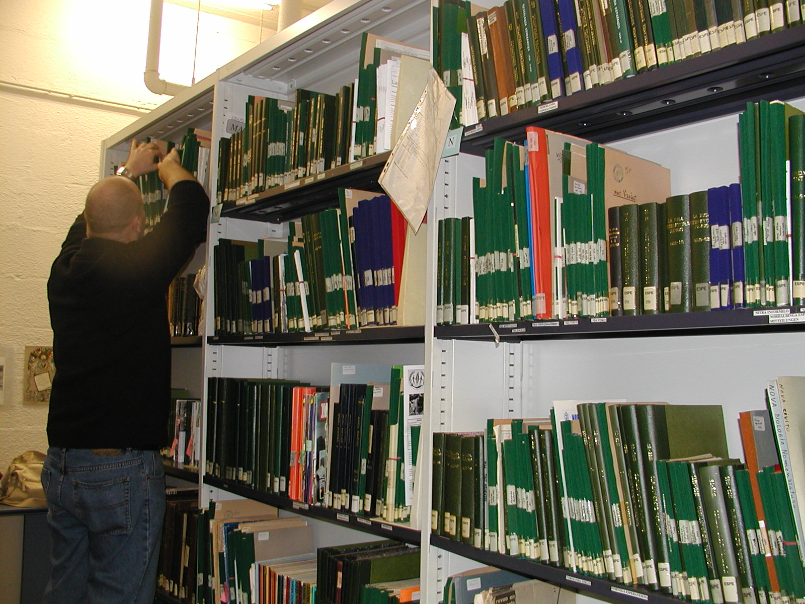 Dum vizito de FLEJA al la fondaĵo Vanbiervliet